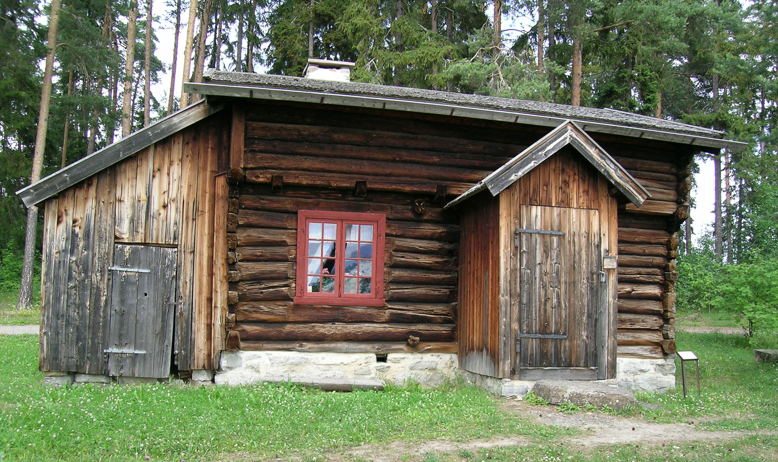 Skarderudstua, husmannsplass (cotter's farm) from Skarderud, Ringsaker, ca. 1750. Hedmarksmuseet, Hamar.